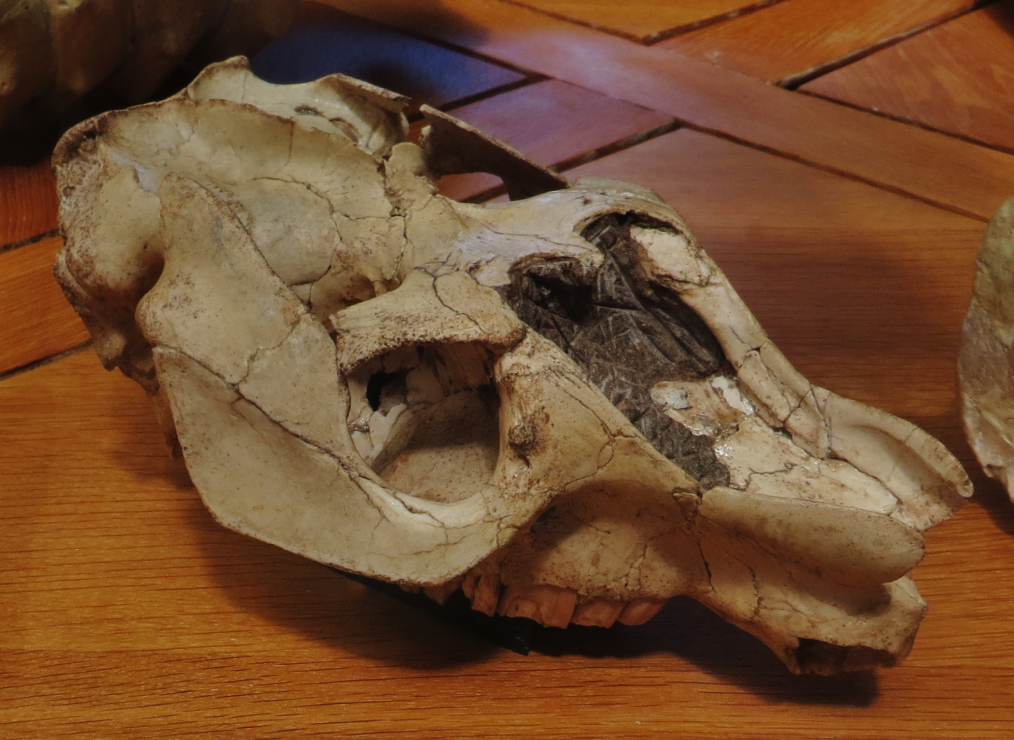 Plesiotypotherium fossil skull